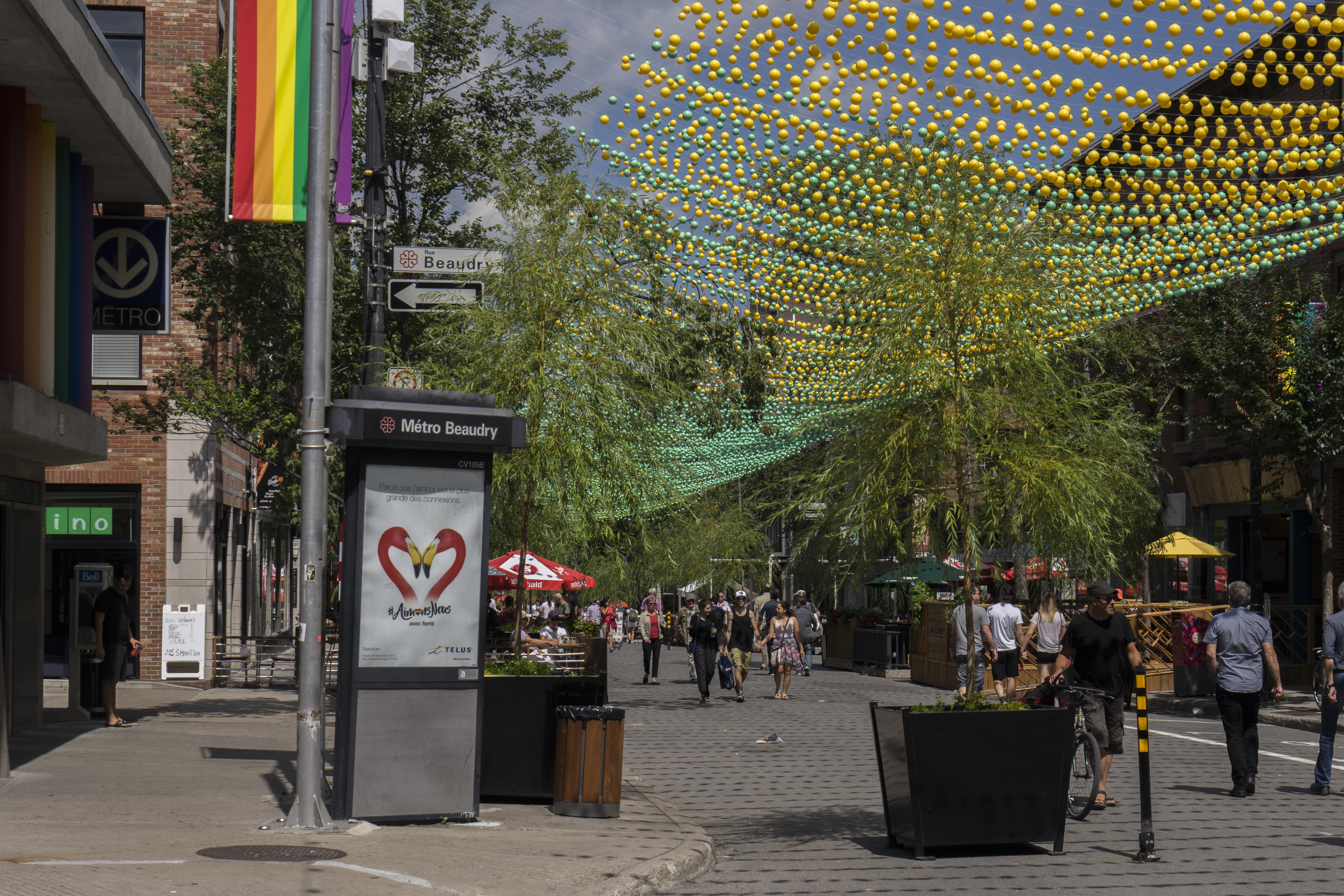 Saint Catherine Street, rainbow, Montreal